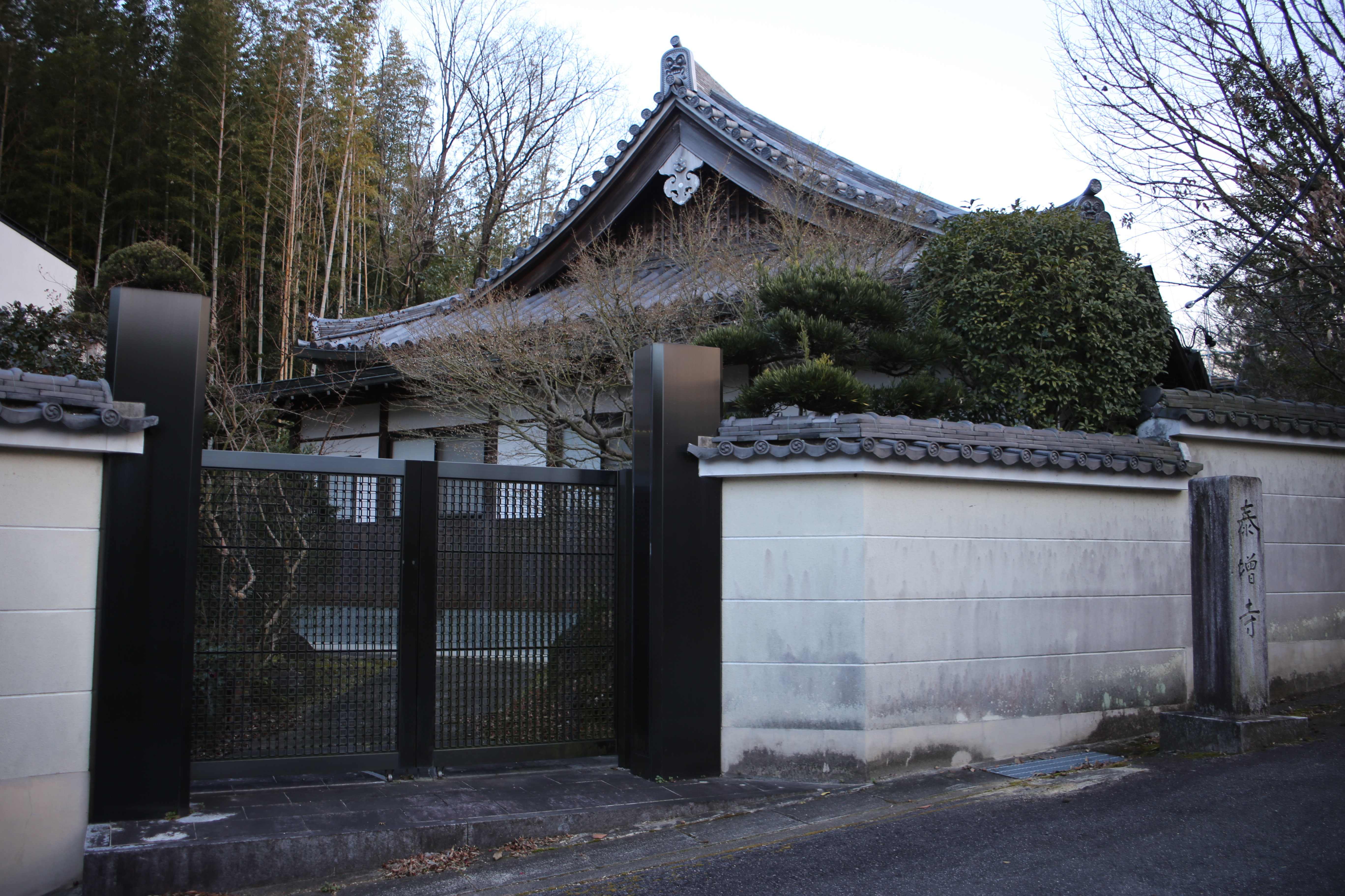 名古屋市天白区天白町平針黒石の曹洞宗泰増寺